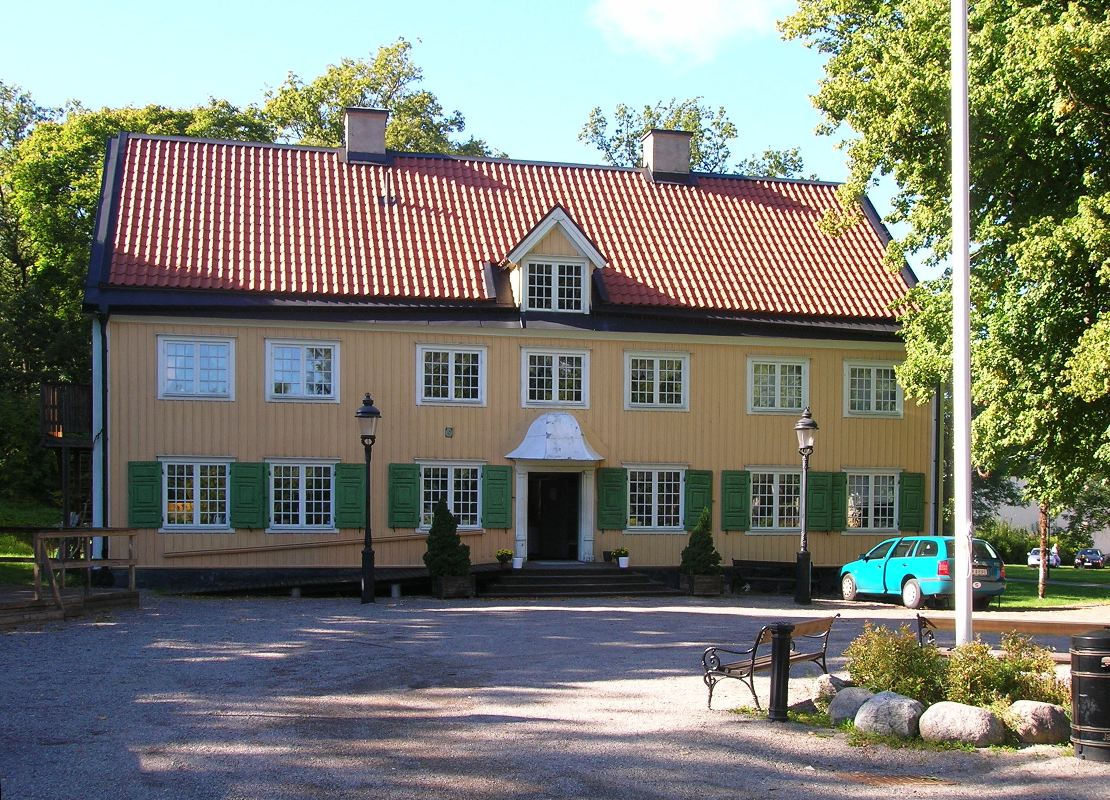 Jakobsbergs gård fick sitt nuvarande utseende av köpmannen Jakob Graver på 1750-talet, Bredäng, Stockholm